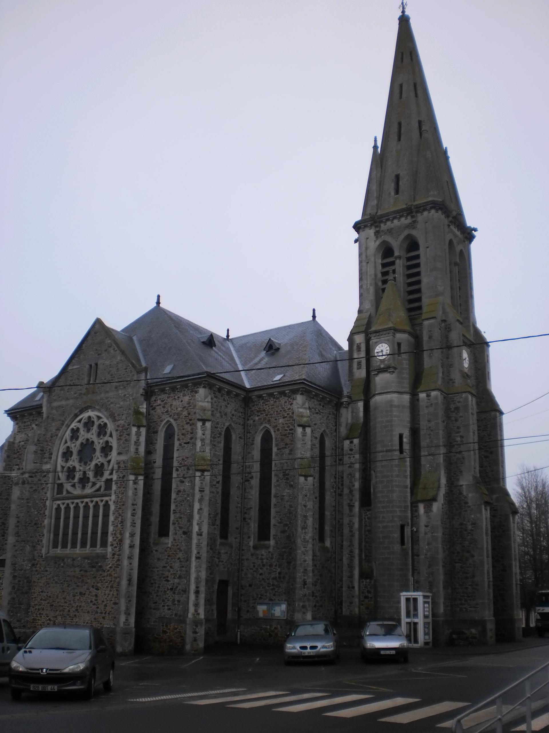 La Rouxière (Loire-Atlantique, France) - église